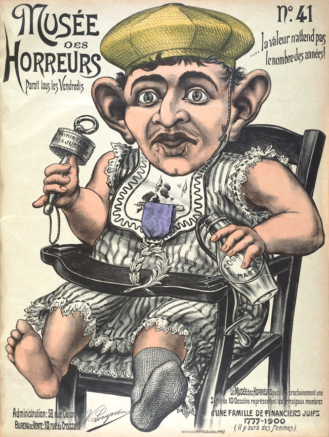 "... la valeur n'attend pas le nombre des années!".